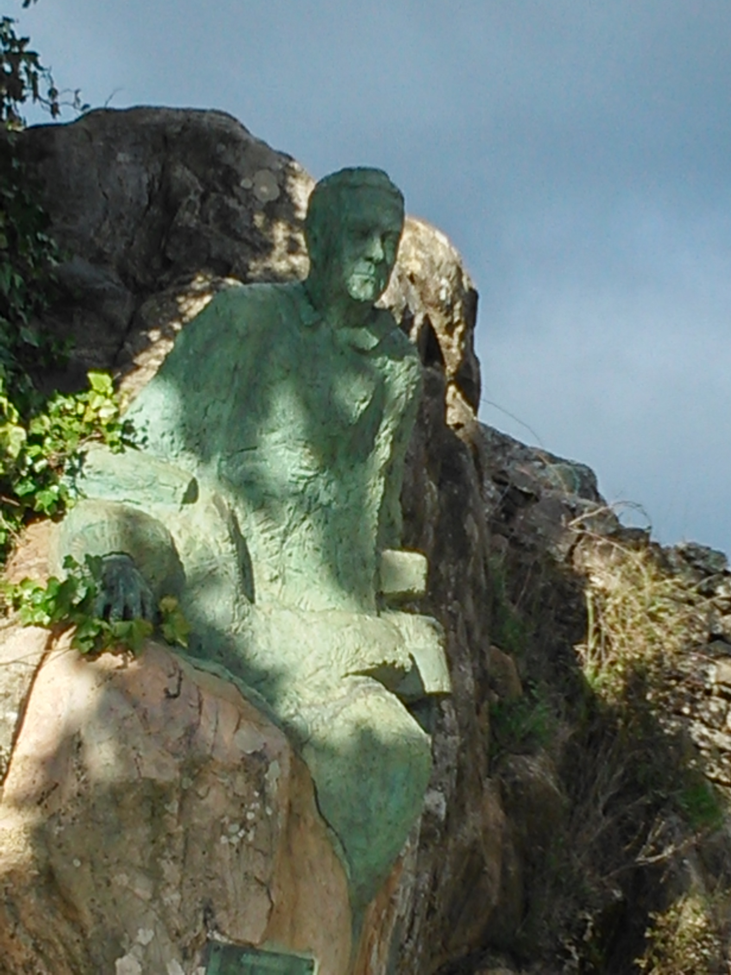 Aracena, España.